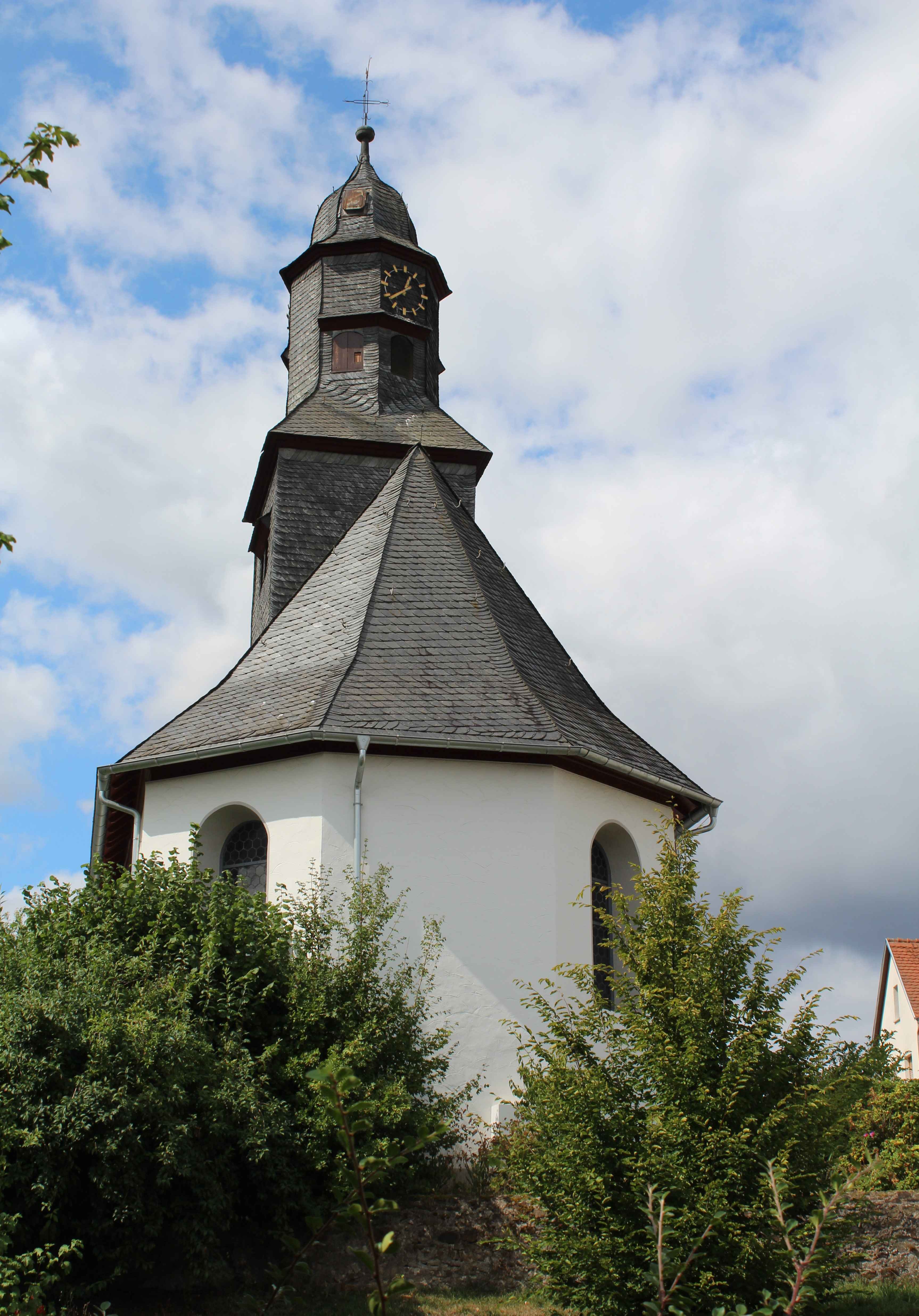 Evangelische Kirche Klein-Rechtenbach, Gemeinde Hüttenberg, Lahn-Dill-Kreis, Hessen, Deutschland